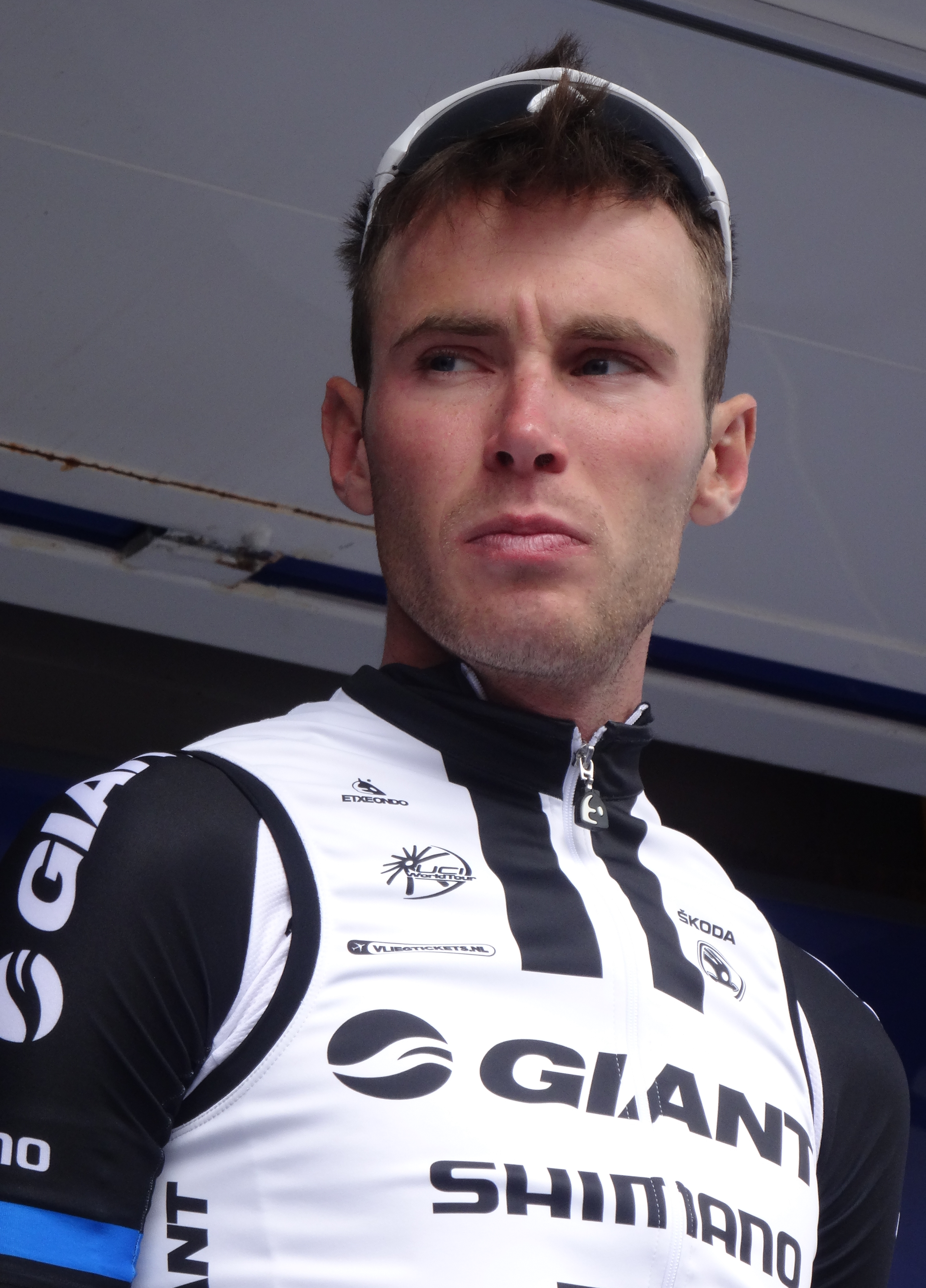 Reportage photographique réalisé le mercredi 7 mai 2014 au départ de la première étape de l'édition 2014 des Quatre jours de Dunkerque à Dunkerque, Nord, Nord-Pas-de-Calais, France. Depicted person: Brian Bulgaç Depicted team: Giant-Shimano